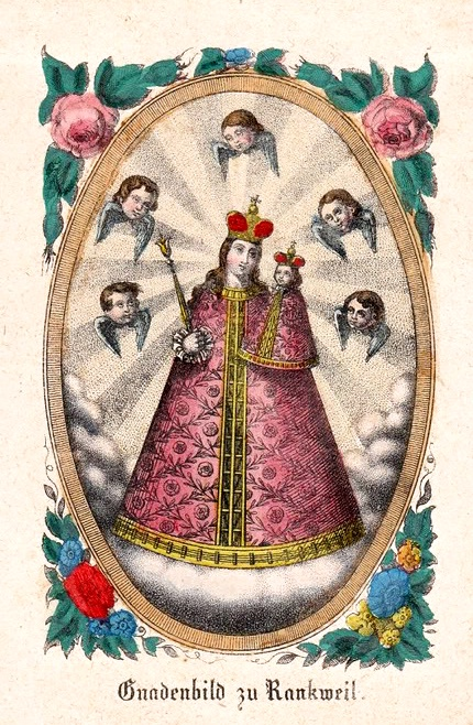 Gnadenbild von Rankweil, Vorarlberg, Österreich